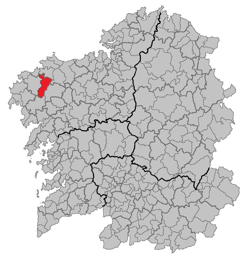 Mapa coa localización do concello de Zas.